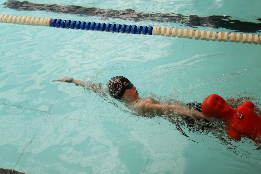 remorquage de manequin